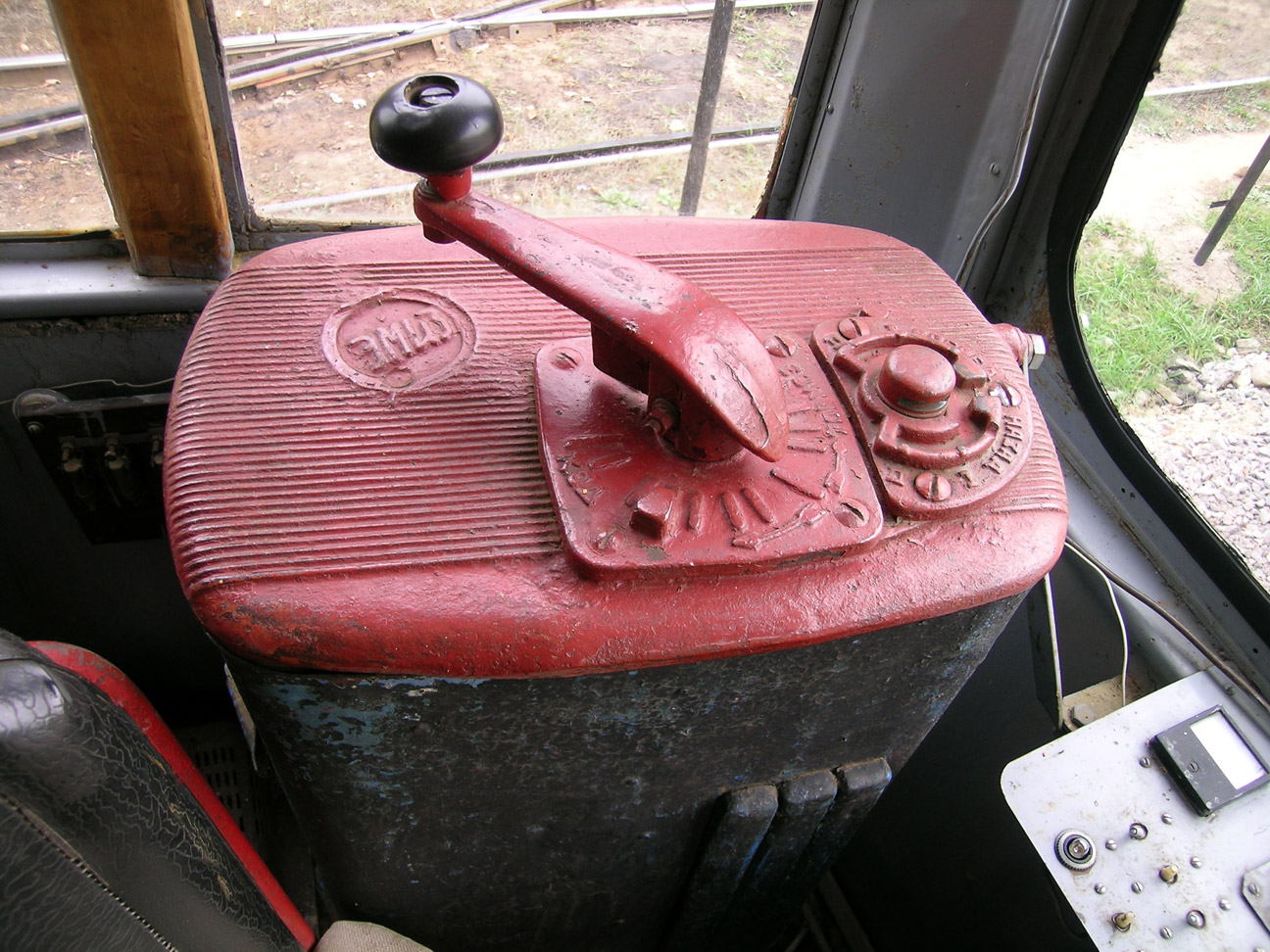 Интерьер кабины водителя трамвайного вагона ЛМ-49. Контроллер с ручкой-«кофемолкой»